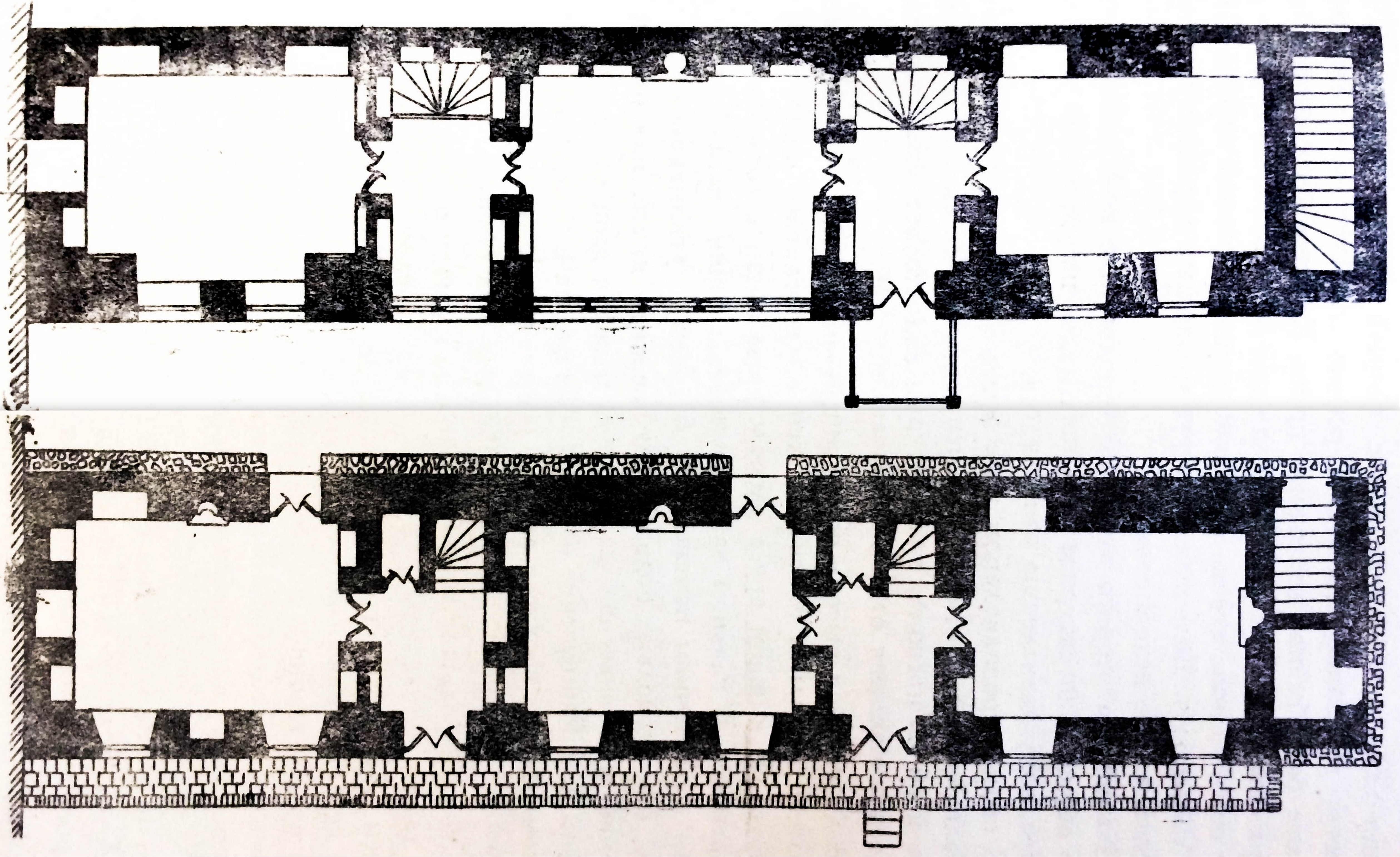 Şəkixanovların evinin birinci və ikinci mərtəbələrinin planı